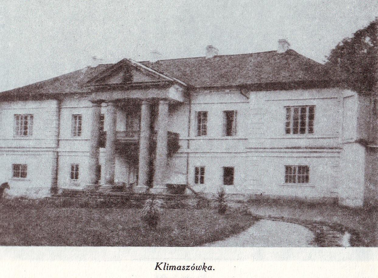 Klimaszówka - dwór